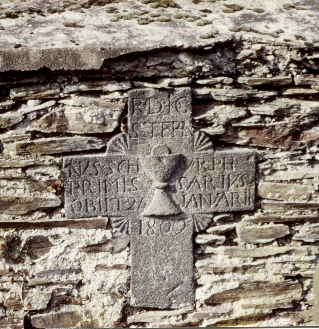 Altes Grabkreuz des 1810 verstorbenen Frühmessers Stephan Schurph in Lösnich 1983.